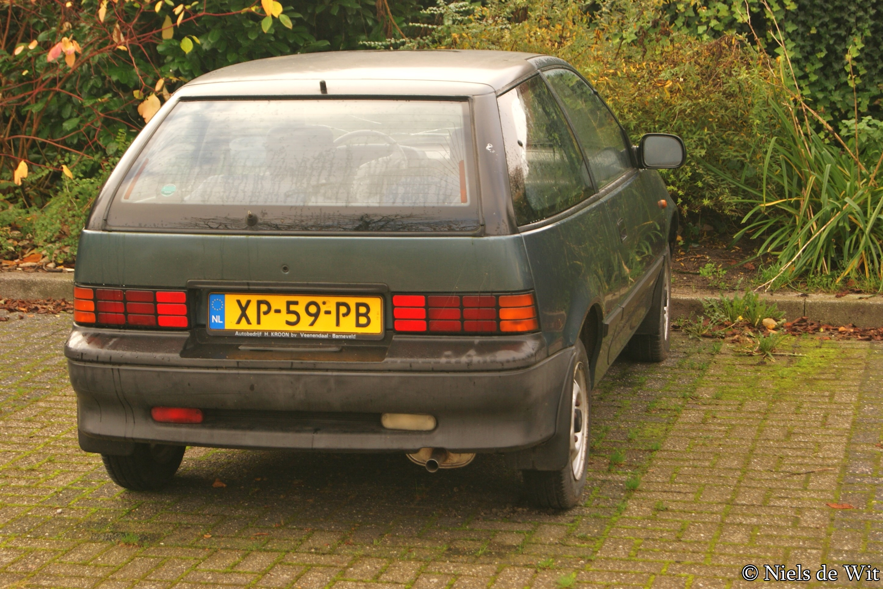 XP-59-PB